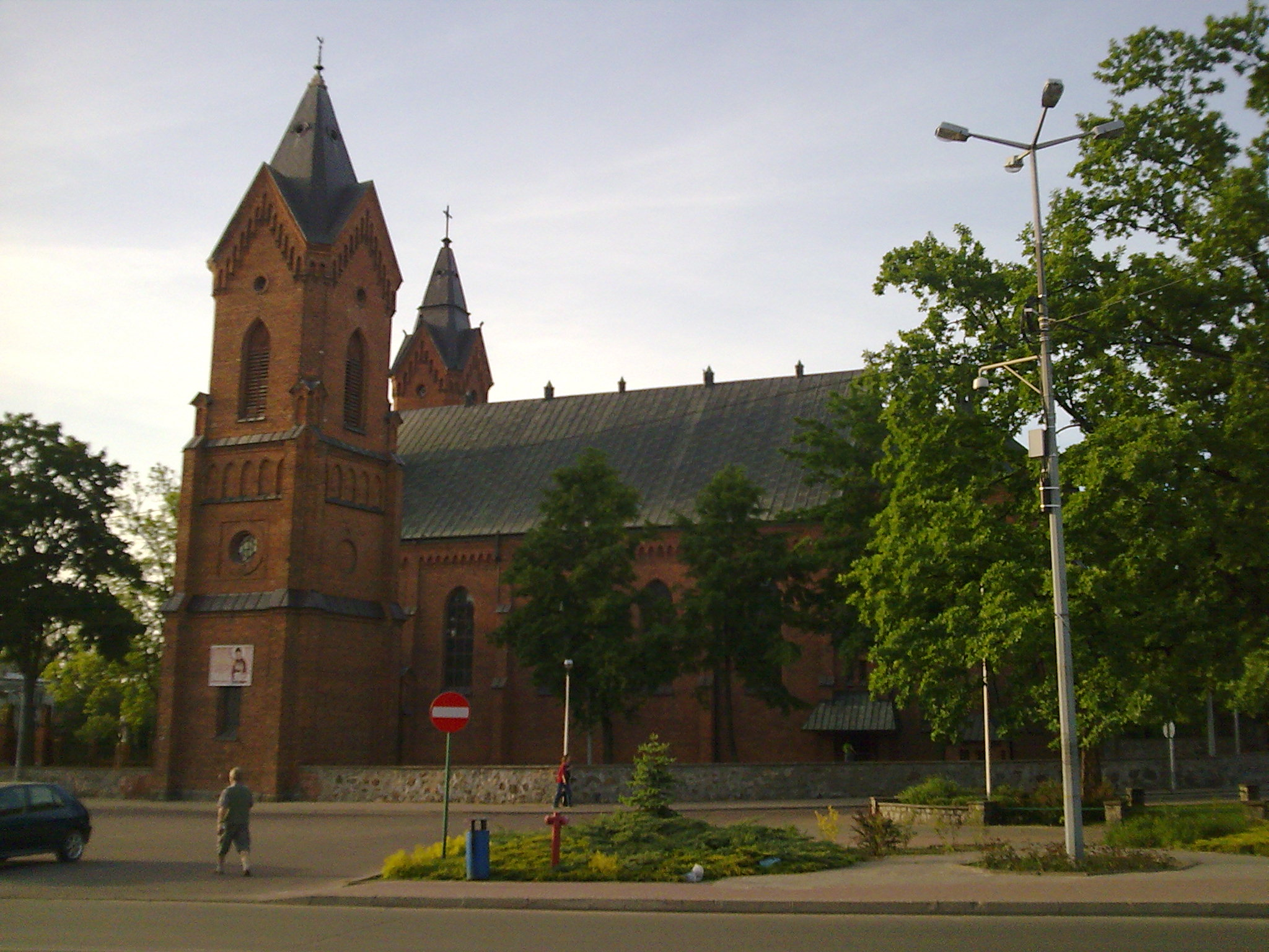 Ostrów Mazowiecka - rzymskokatolicki kościół parafialny p.w. Wniebowzięcia NMP, 1885-1893